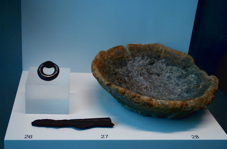 Cargamento del barco fenicio Mazarrón II. s.VII ad.C.. Arqua Museo Nacional de Arqueología Submarina.